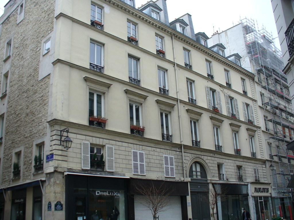 Casa natal de Rudolf Diesel, 38 rue Notre-Dame de Nazareth, en el Distrito III de París, en Francia